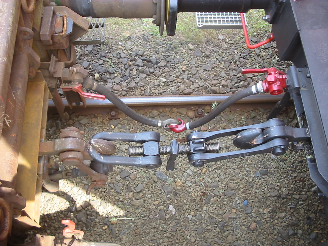 Schroefkoppeling (vast)